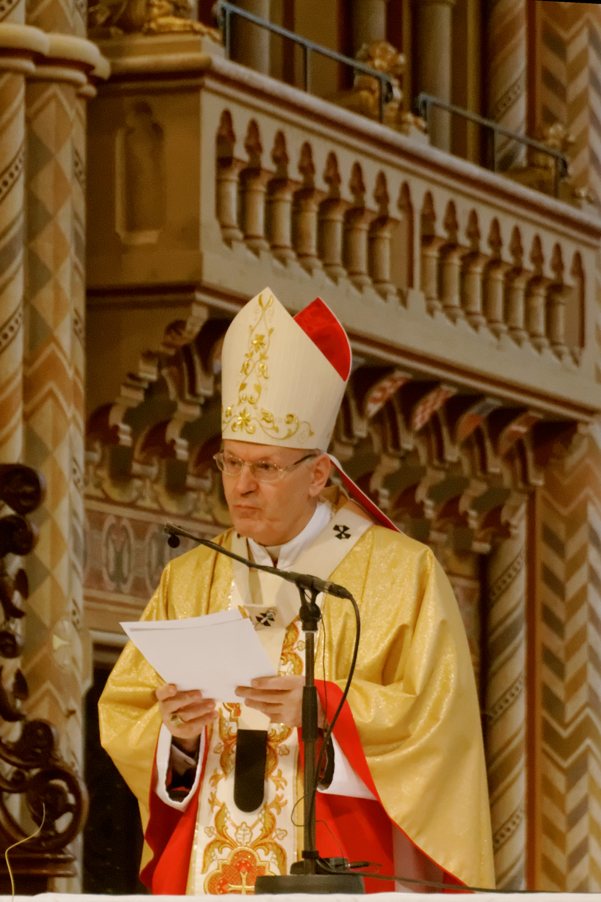 Peter Kardinal Erdö